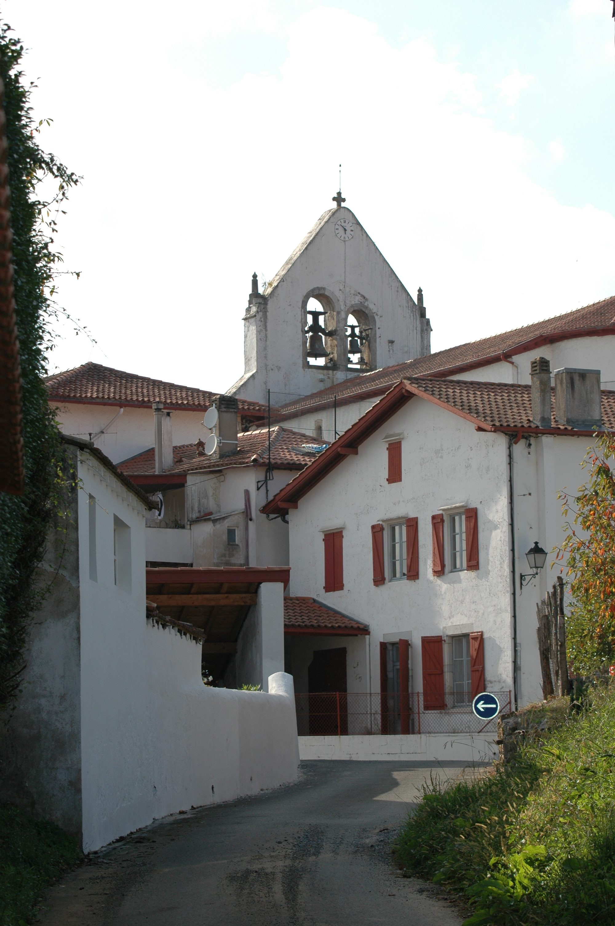 Ahetze, l'église au détour d'une ruelle